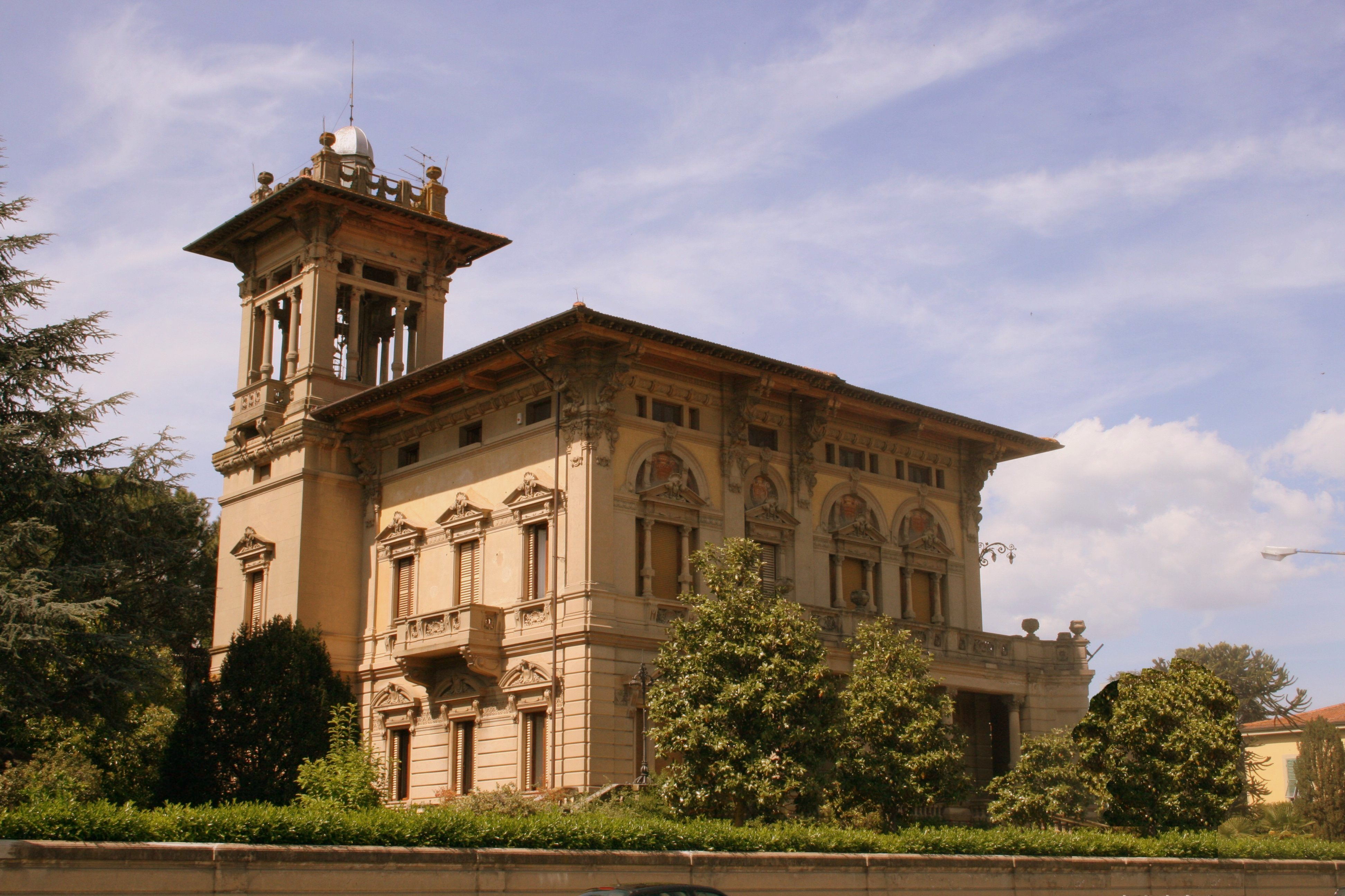 Villa Masini in Montevarchi